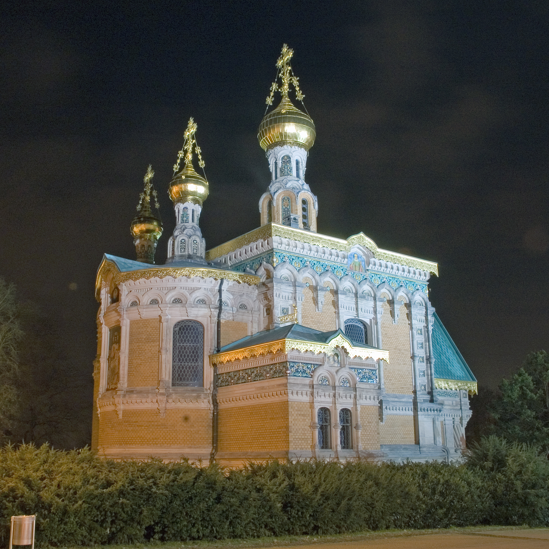 Germany Darmstadt Künstlerkolonie Mathildenhöhe Russische Kapelle Leontij Nikolajewitsch Nebnois